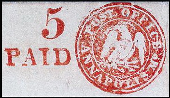 Почтовая марка США, ANNAPOLIS. Scott №2XU1